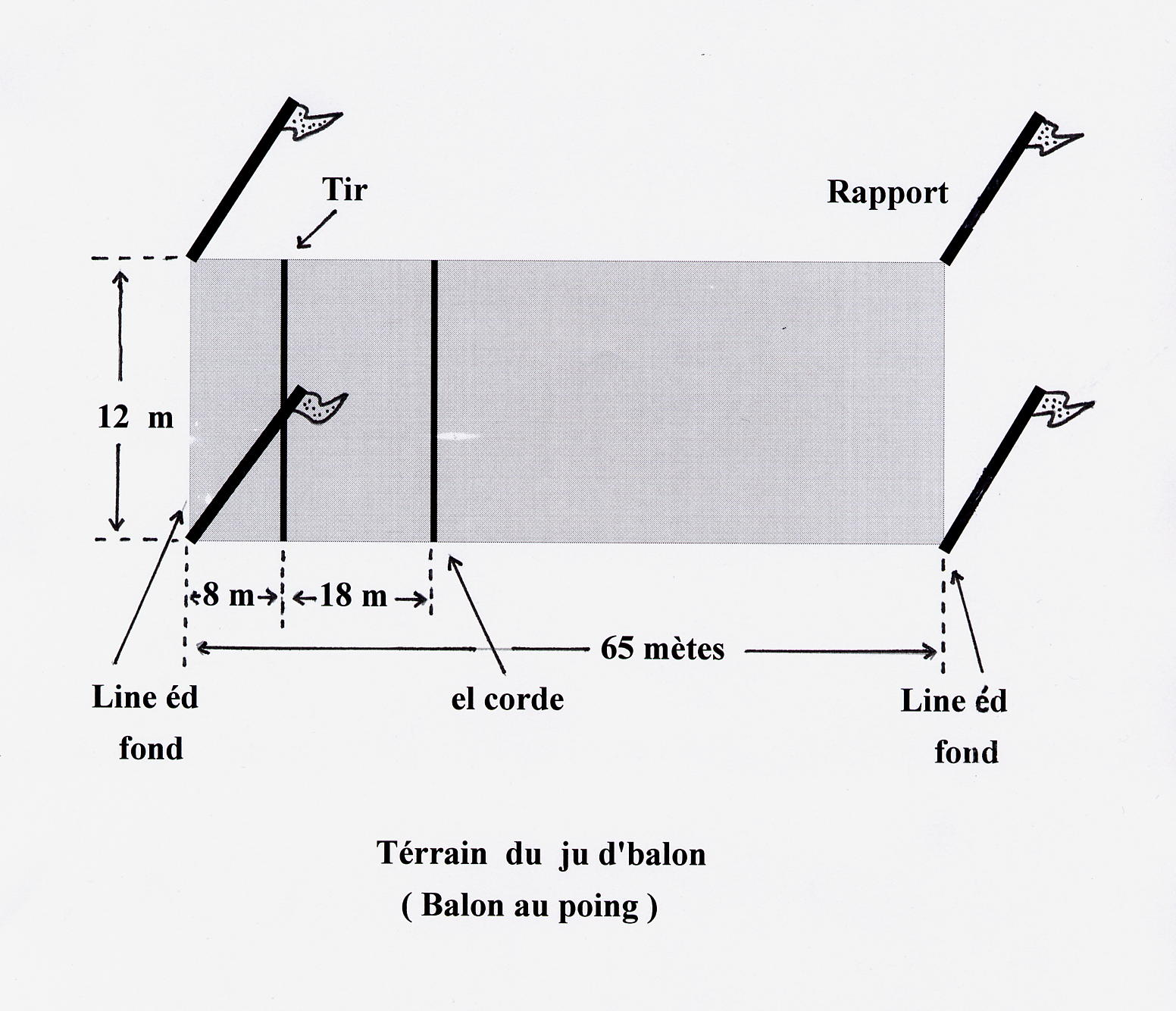 Picard: Térrain ed Ju d'balon (Balon au poing) aveuc el corde, el line éd tir et pi chés rapports et chés lines éd fond.